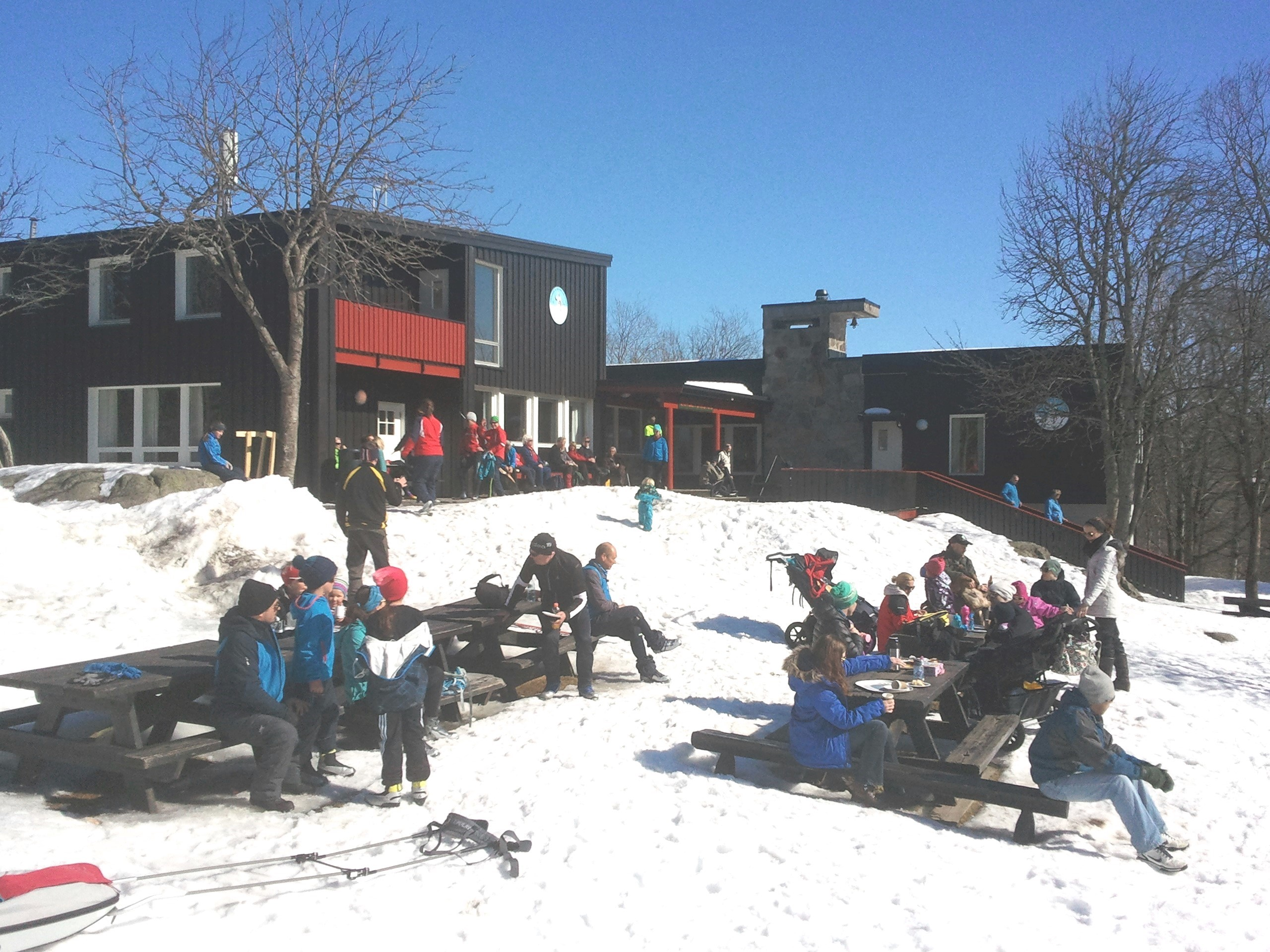 Vangen skistue i Østmarka, Enebakk kommune